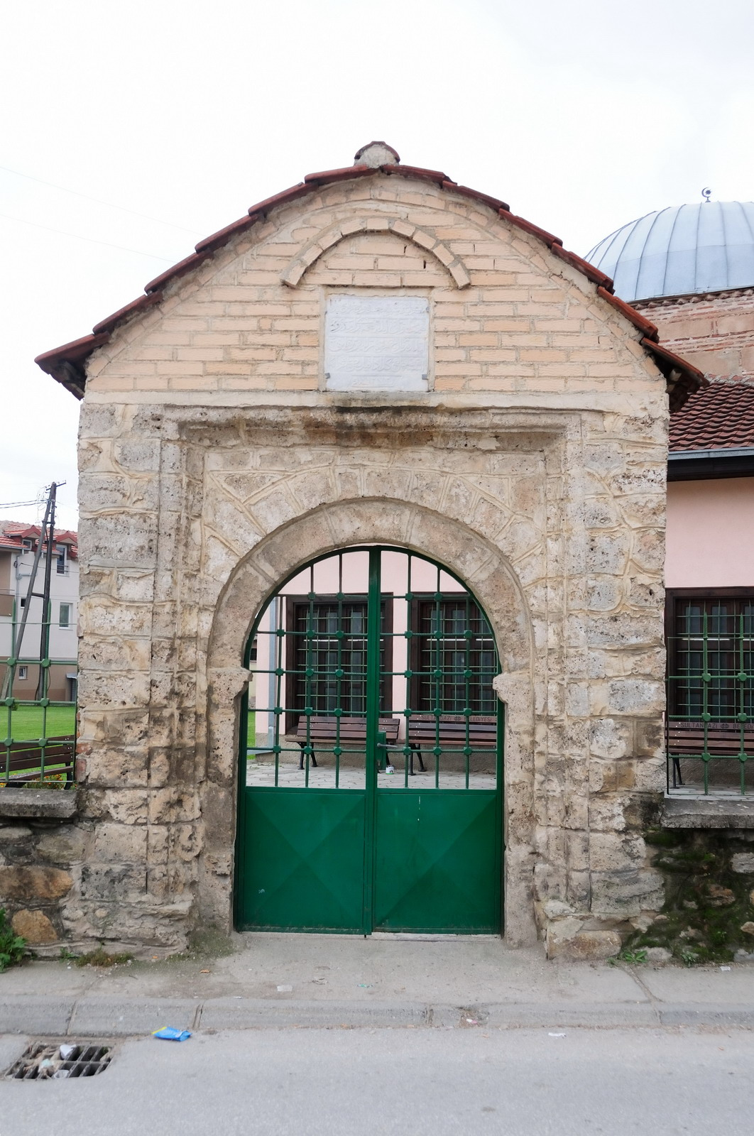 Djamija Hamza Bej-Bitola